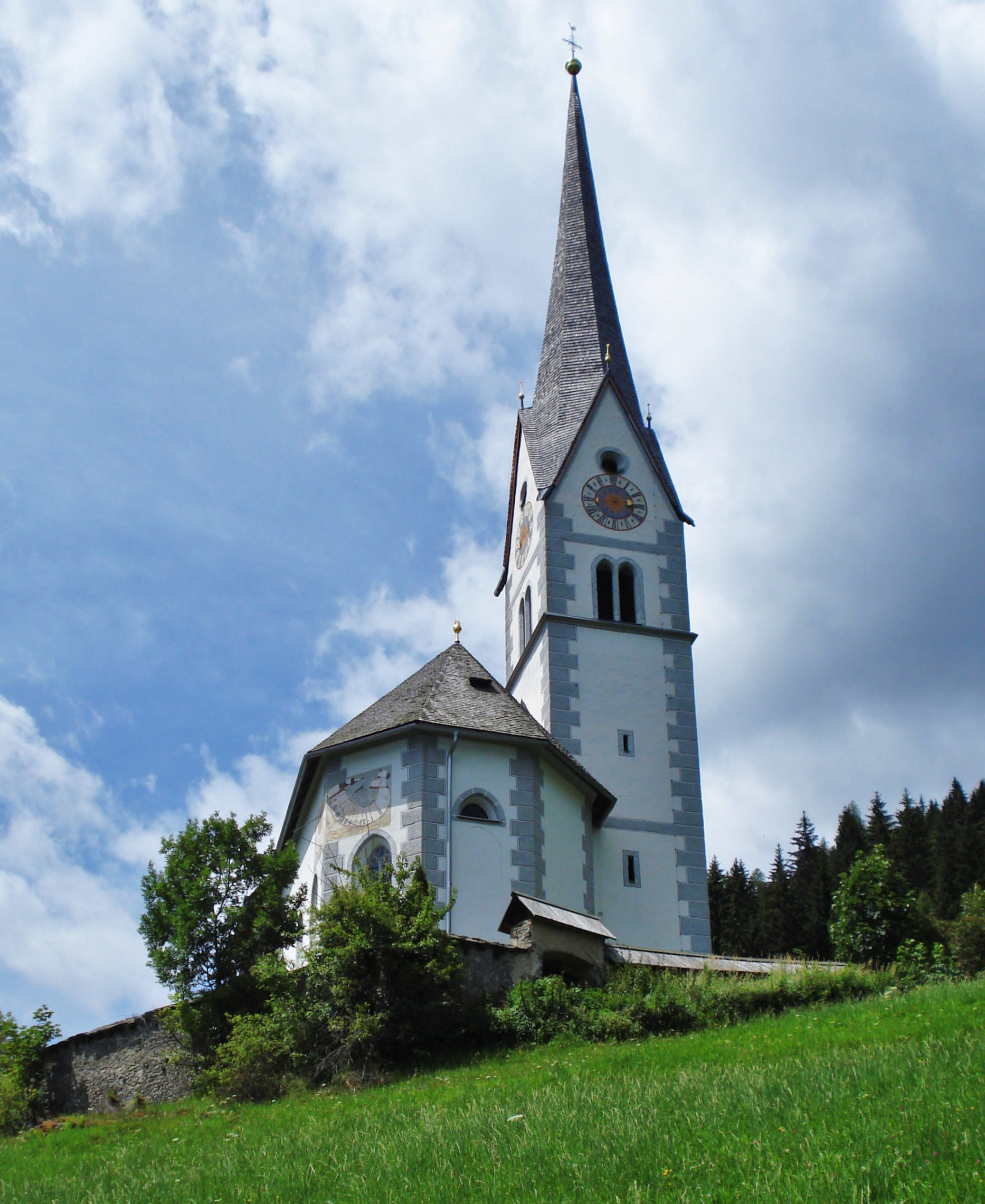 Kath. Pfarrkirche hll. Rupert und Virgil, Außerteuchen, Gemeinde Himmelberg, Bezirk Feldkirchen, Kärnten, Österreich.